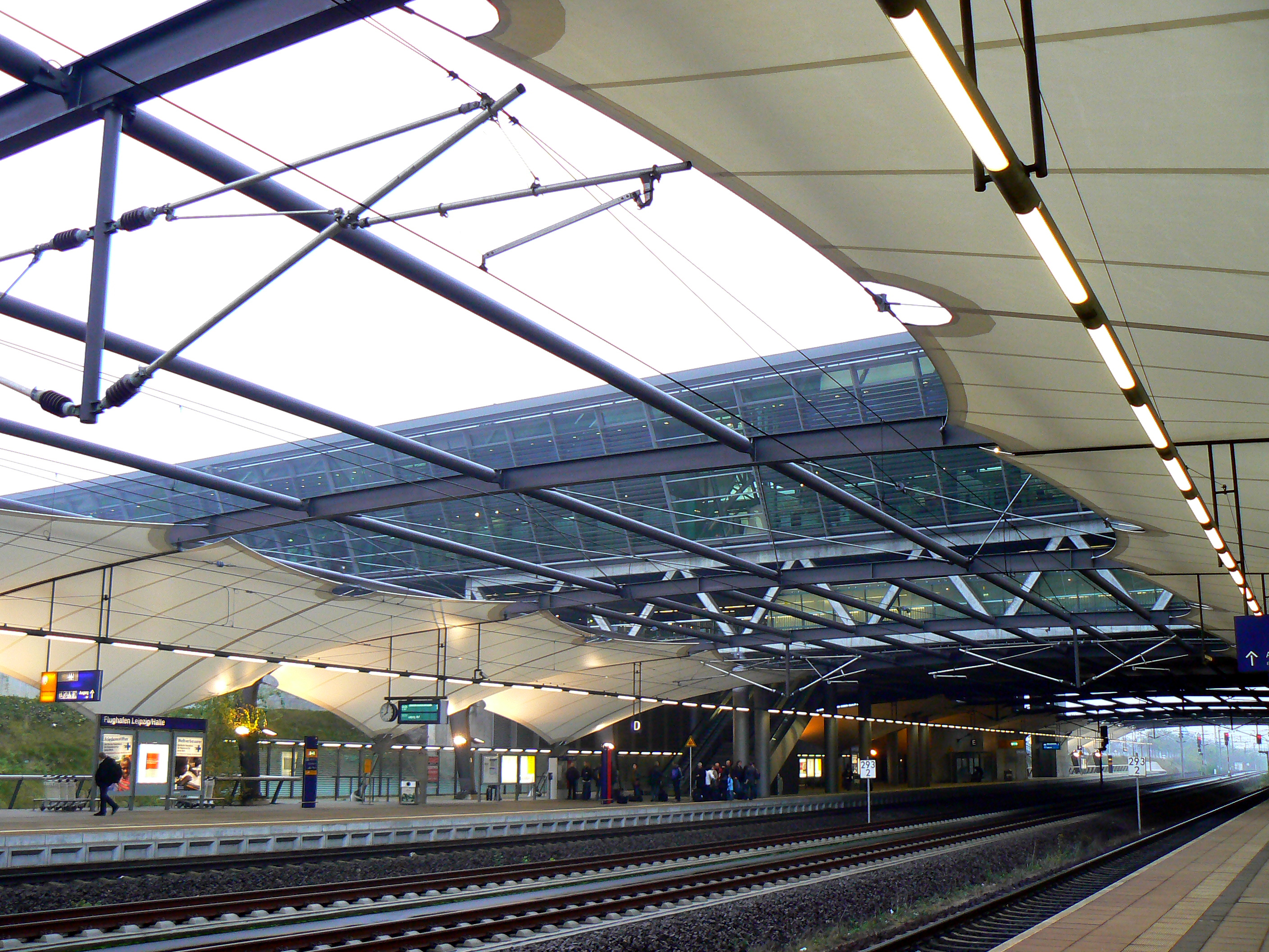 Bahnhof Flughafen Halle/Leipzig